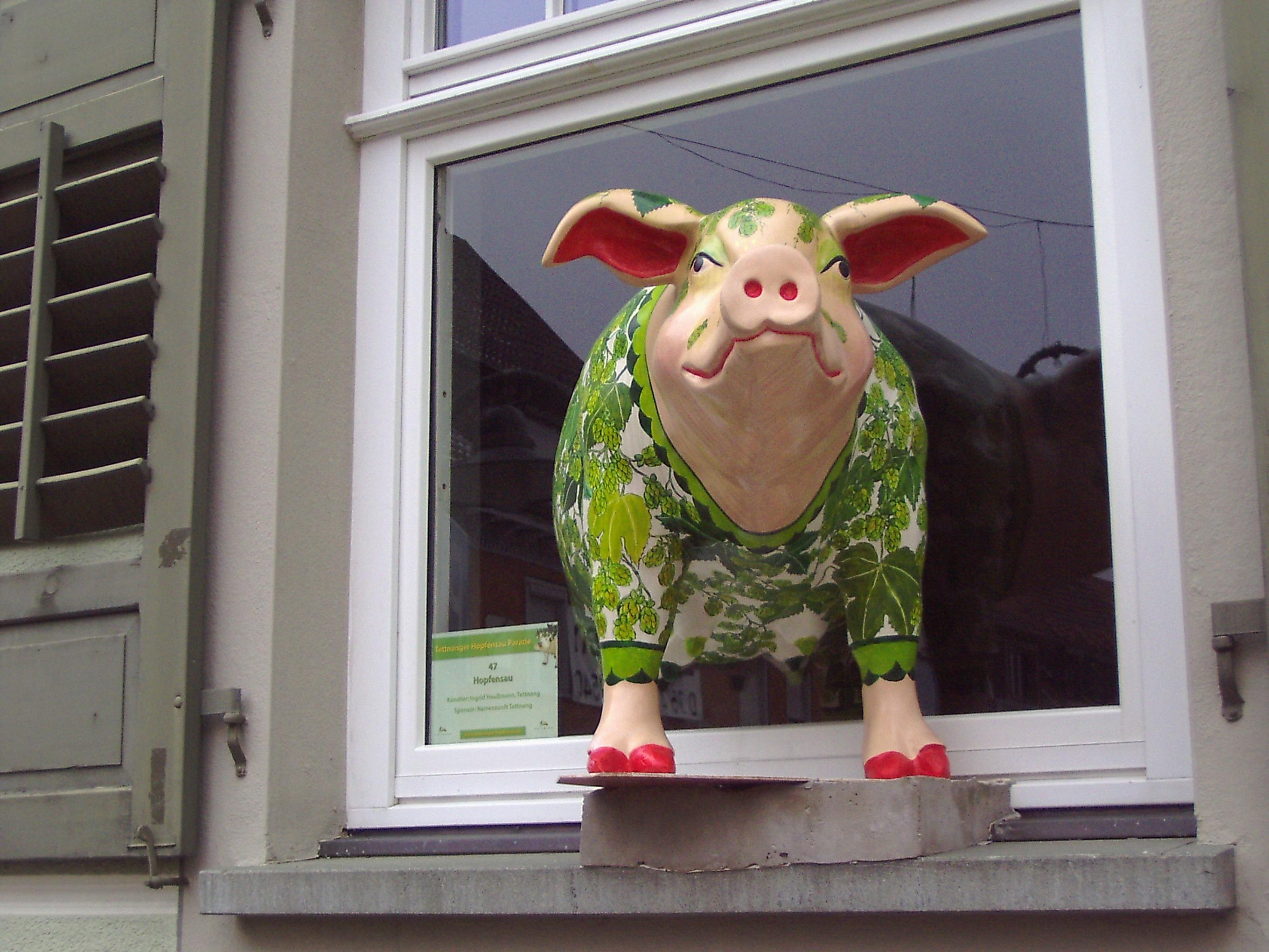 Hopfensau Nr. 47 in einem Fenster in Tettnangs Altstadt